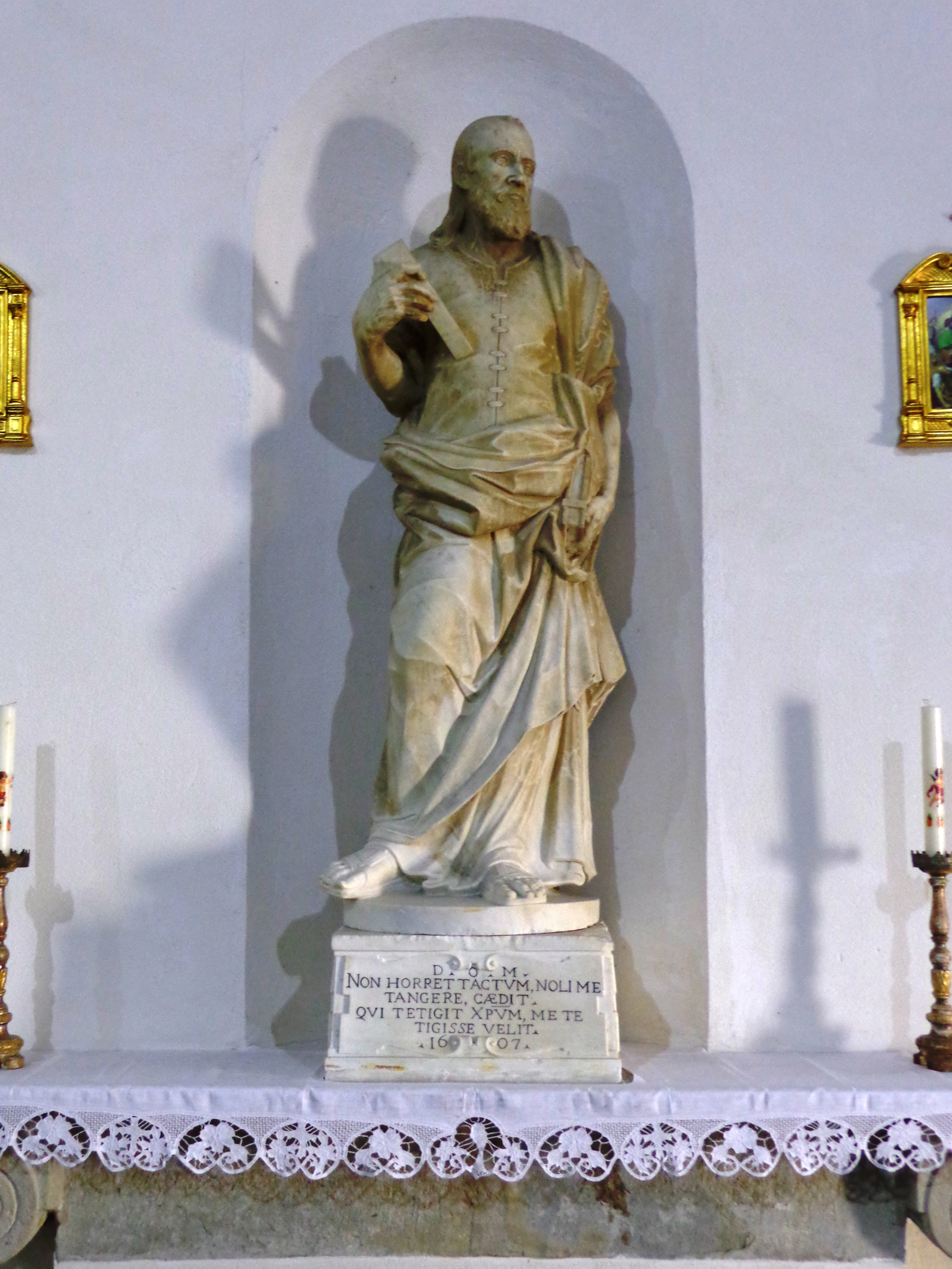 Castroreale_04_2014_07